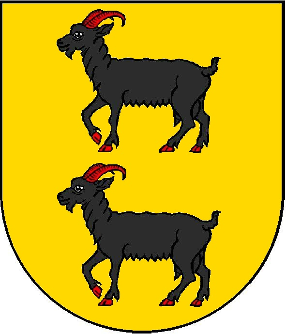 Brasao da Família Baião